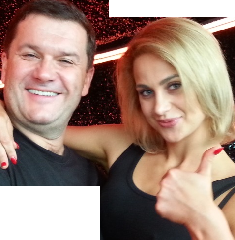 Aktor Robert Wabich i tancerka Hanna Żudziewicz za kulisami programu "Dancing with the Stars. Taniec z gwiazdami" w 2016 roku